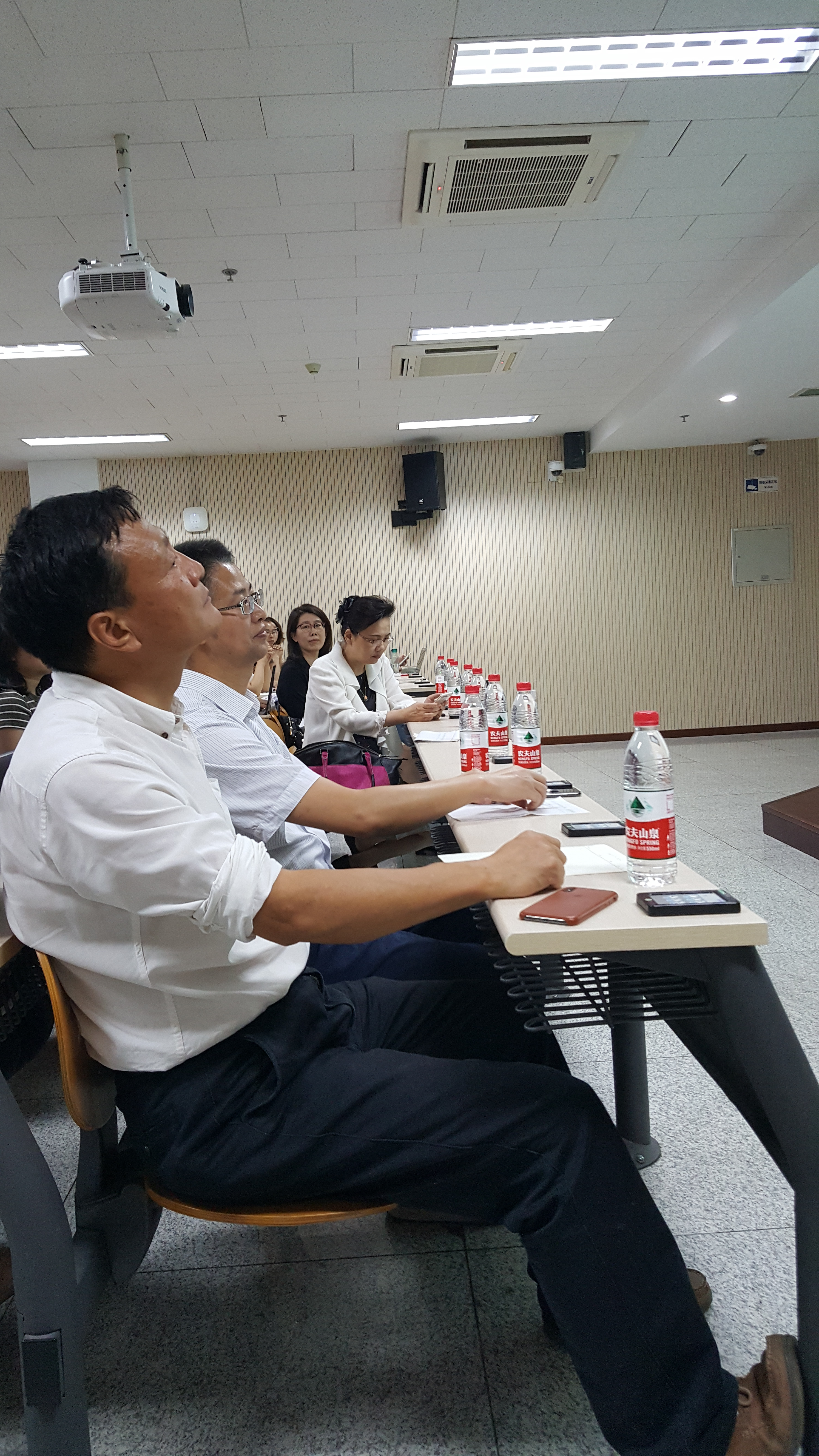 俞孔坚教授